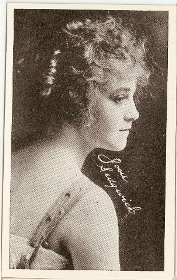 Josie Sedgwick